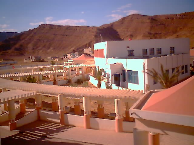 L'Institut supérieur des études technologiques de Gafsa (Tunisie)